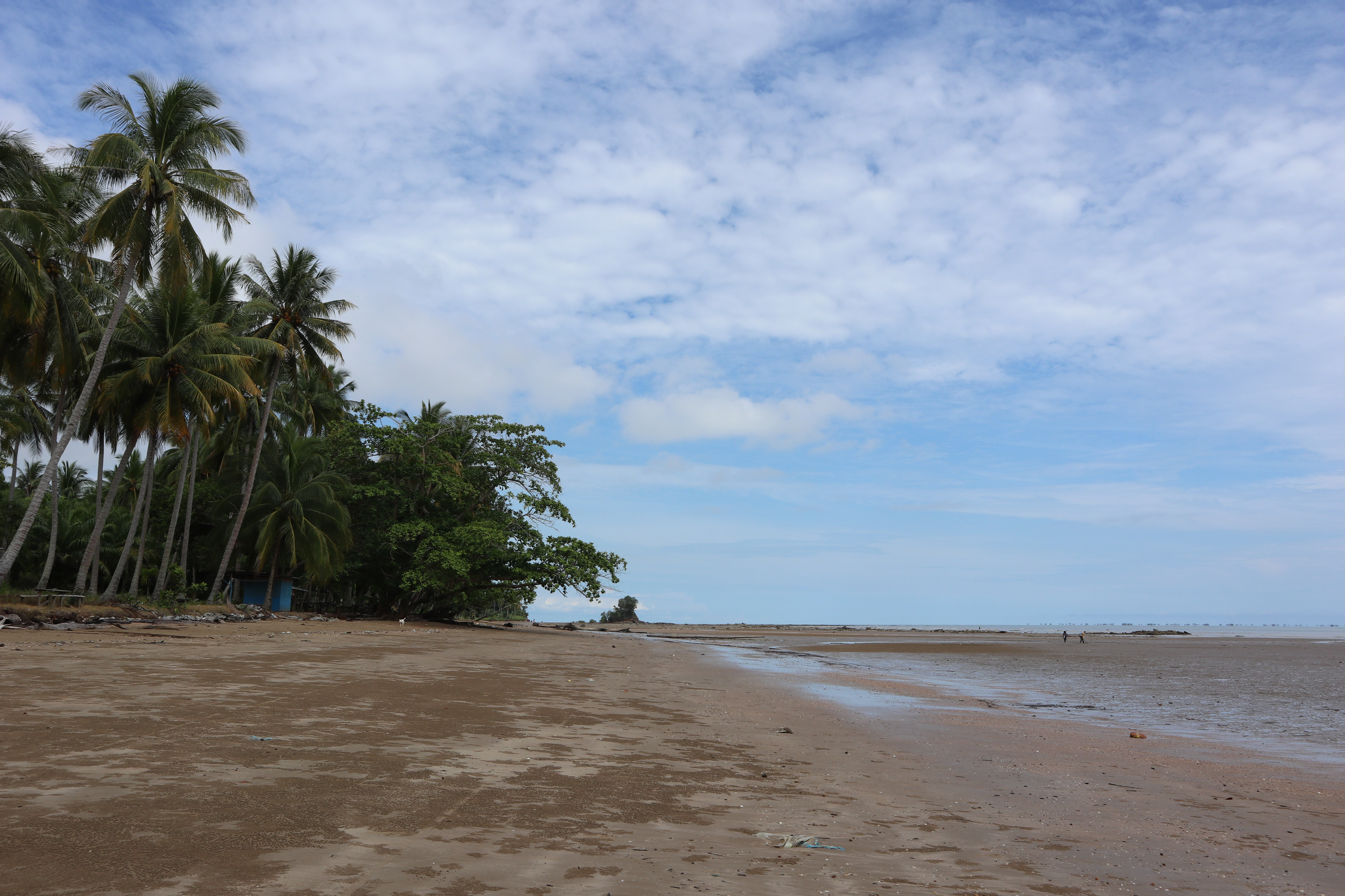 Pantai Batu Lamampu, objek wisata alam di Pulau Sebatik, Kabupaten Nunukan.